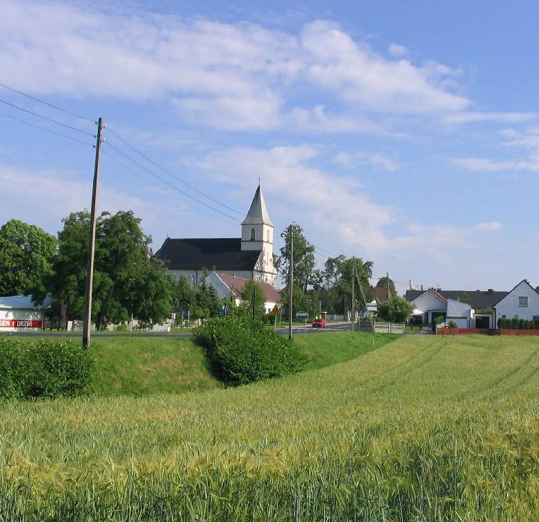 kościół par. p.w. Świętej Trójcy, 1867-72